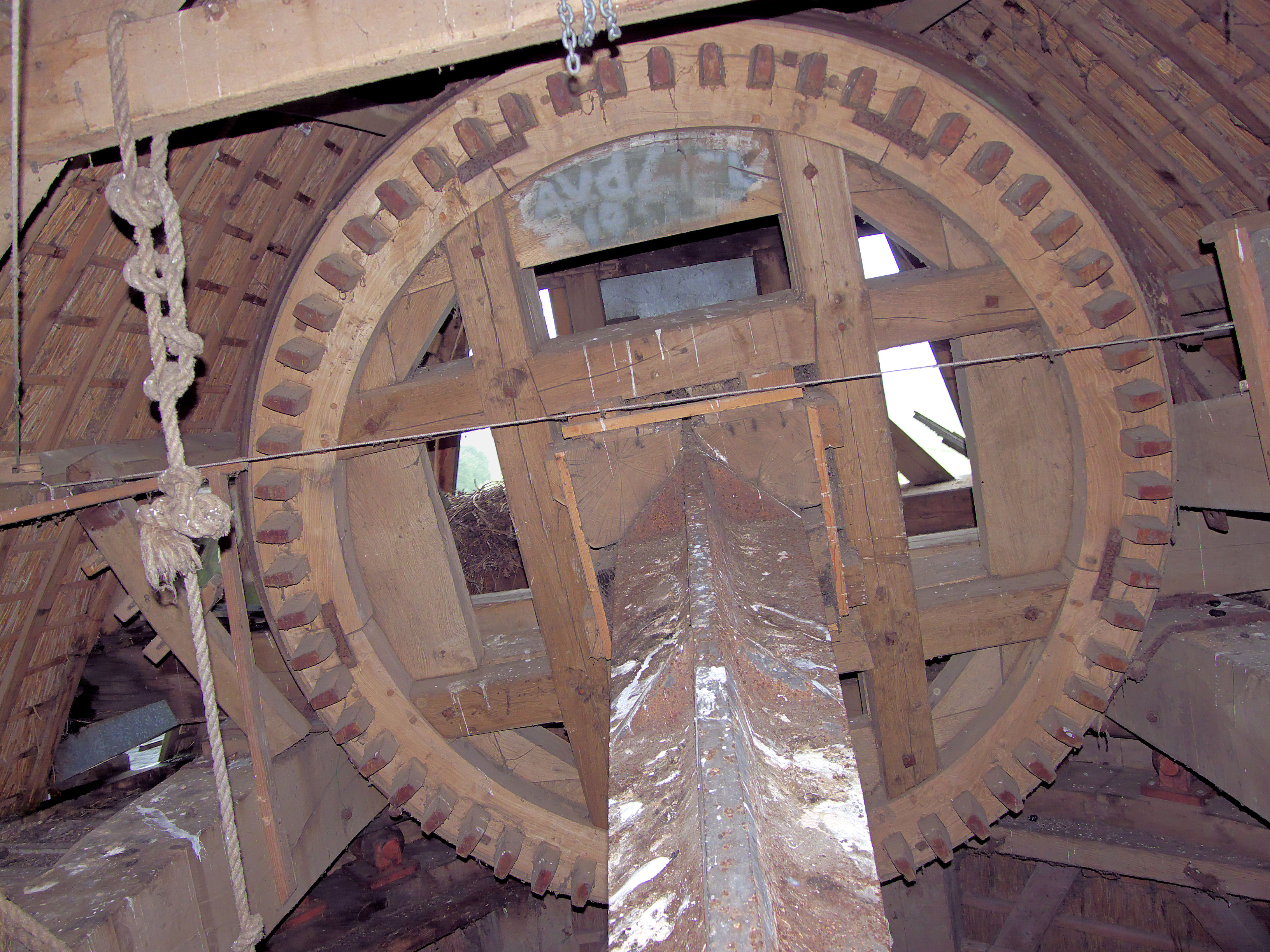 Molen De Hoop, Oldebroek, bovenwiel met ijzeren bandvang